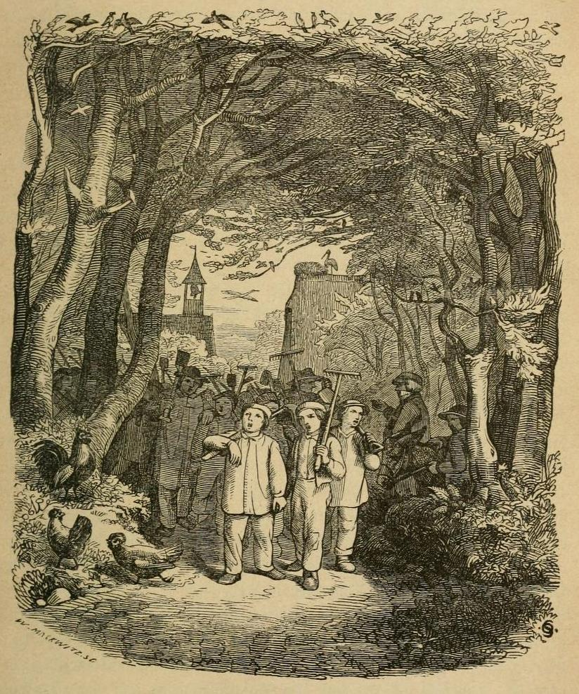 Idealisierte Darstellung, mit Gesang unterwegs zur Arbeit